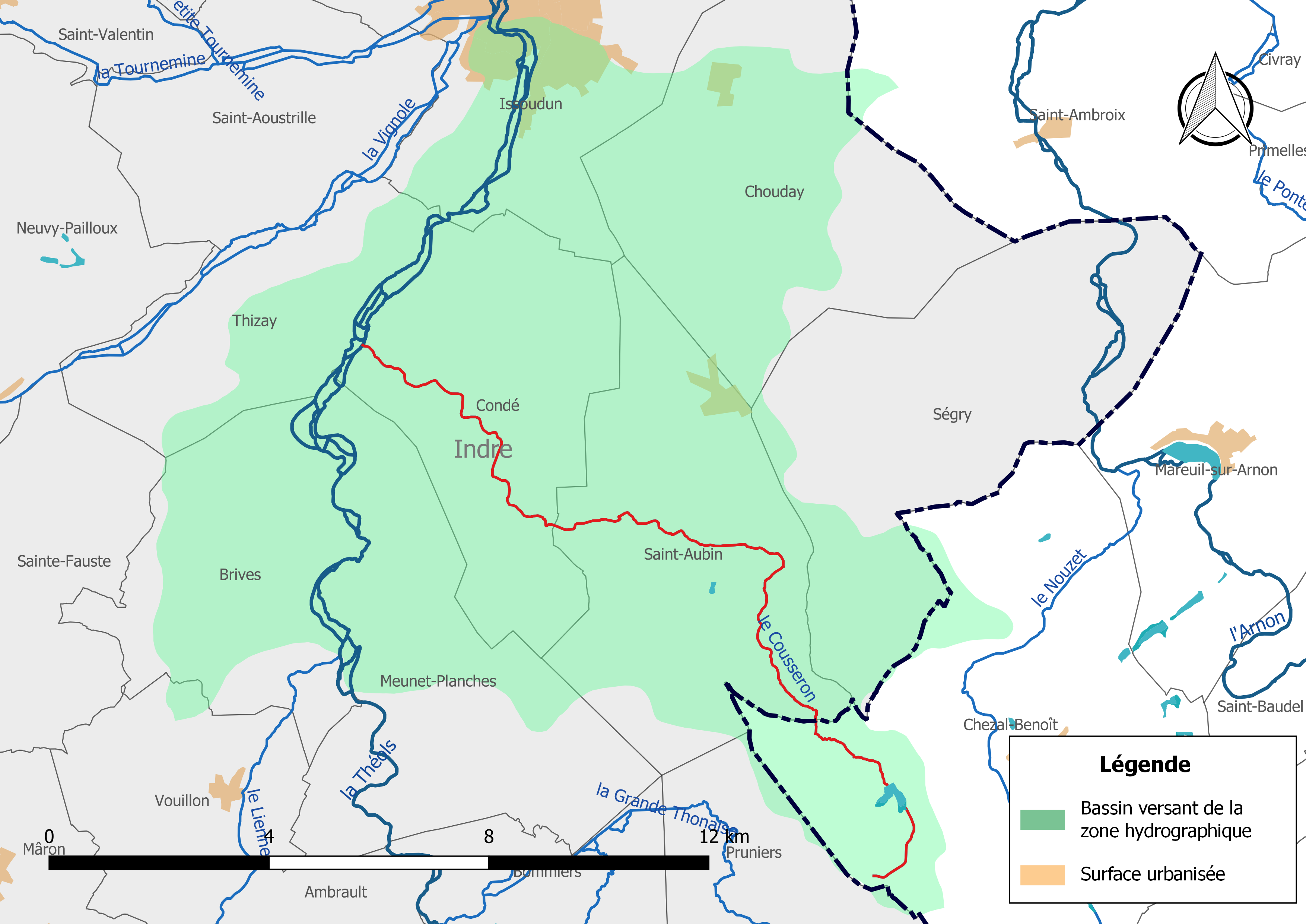 Carte du cours d'eau « le Cousseron » (France) et de la zone hydrographique dans laquelle il s'insère.